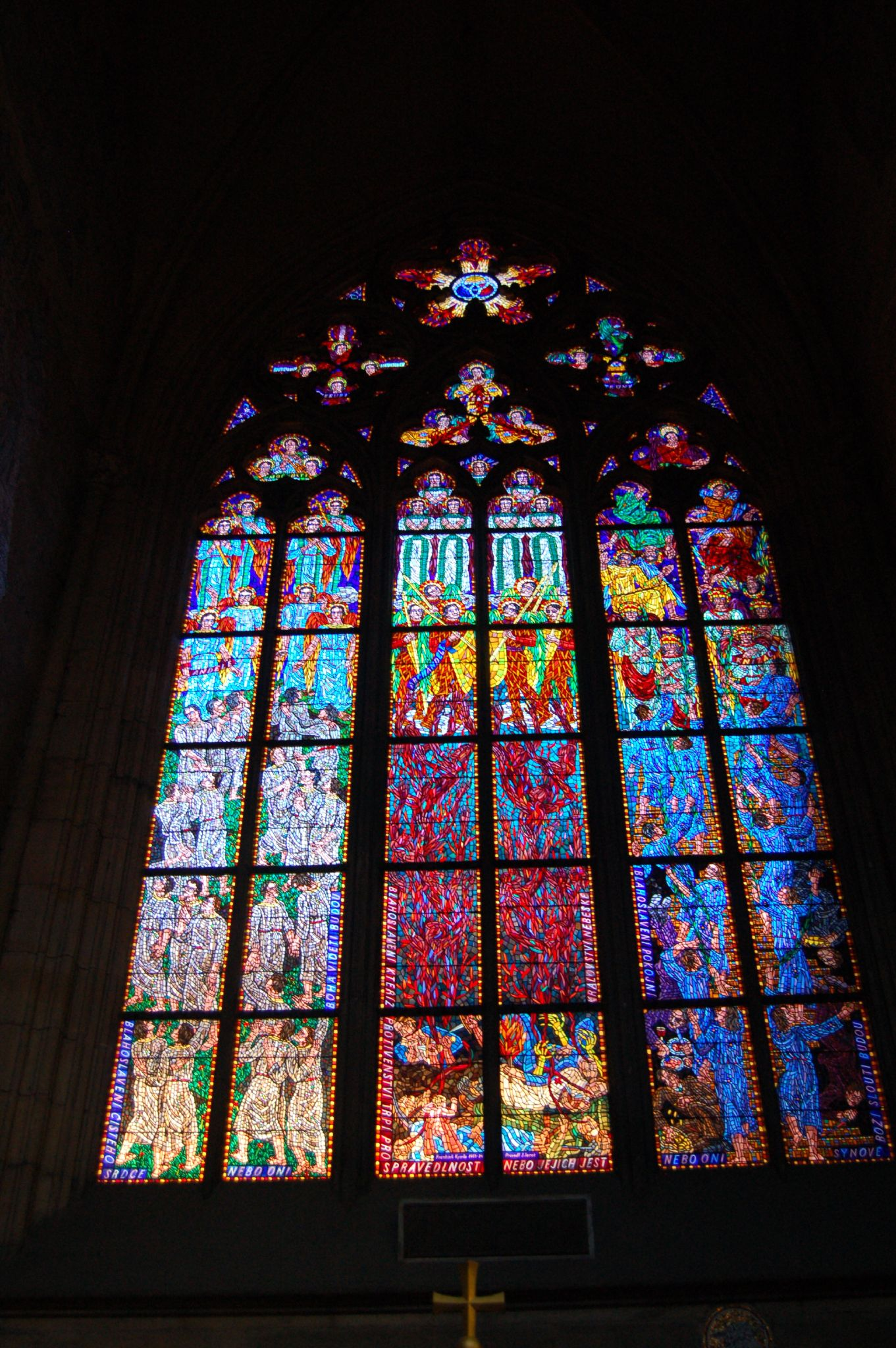 Praha, Katedrála svatého Víta, Václava a Vojtěcha, kaple Bartoňů z Dobenína, vitraj F. Kysely: Blahoslavenství